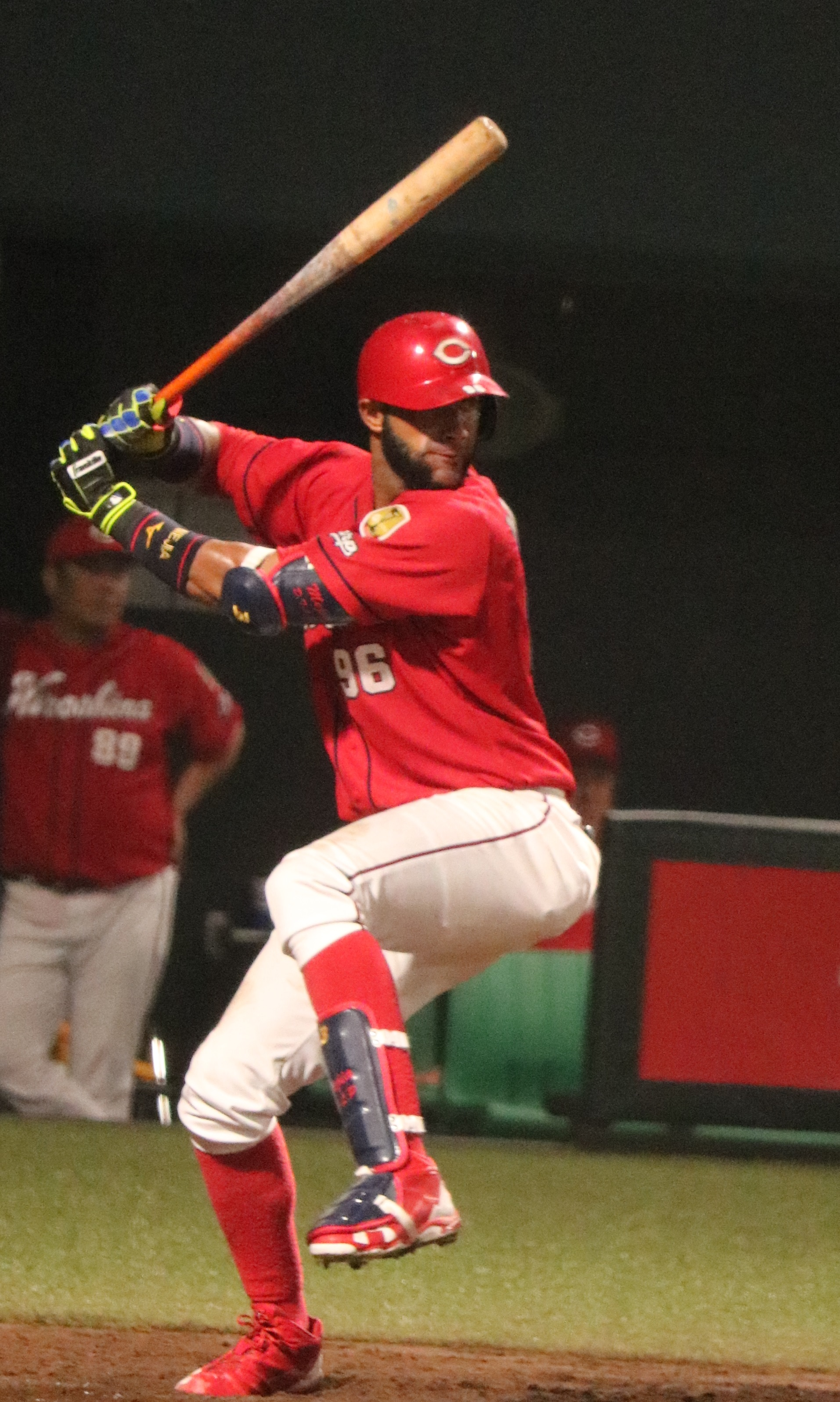 打席でのメヒア(2017年7月28日 タマホームスタジアム筑後で撮影)